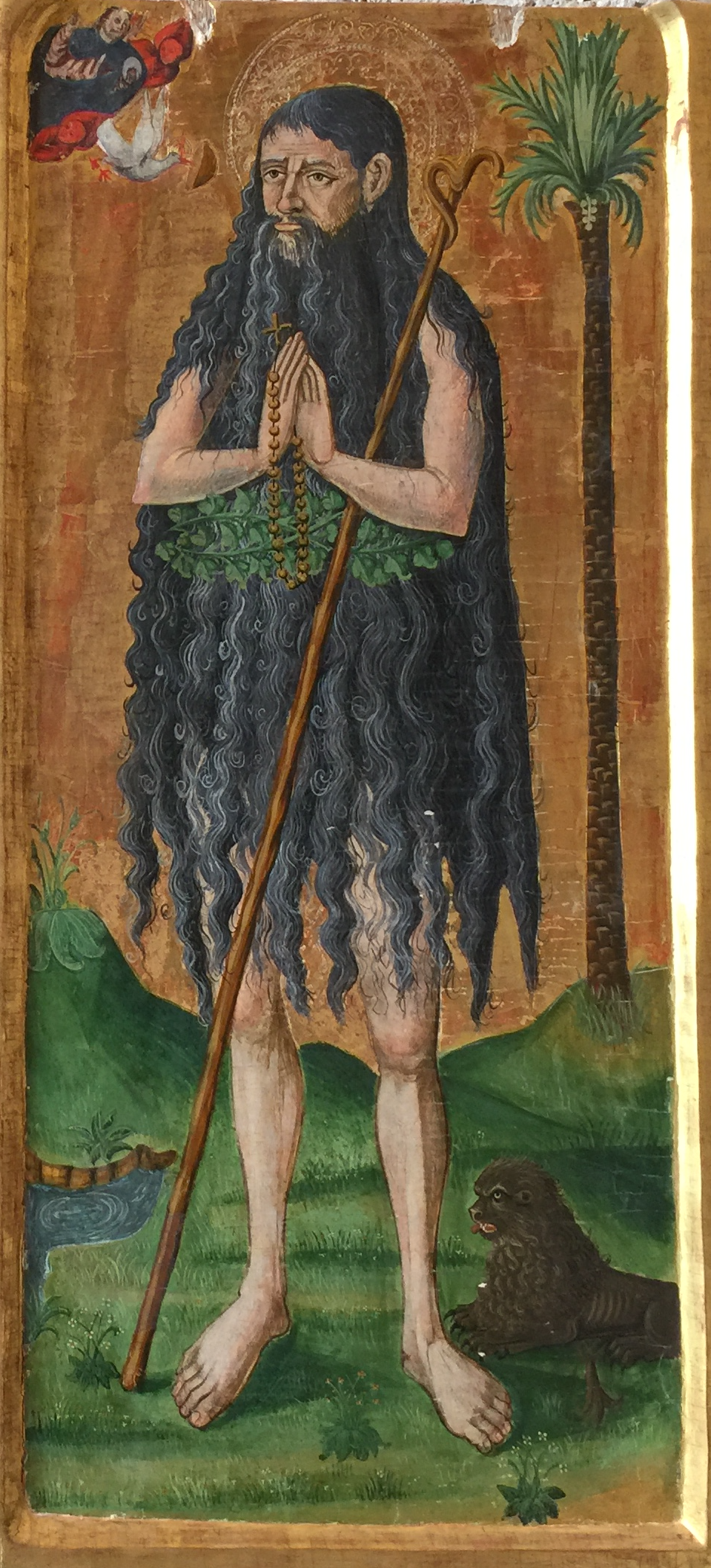 Ce tableau de l'ermite, qui se trouvait dans la Chartreuse de Vall de Crist, est maintenant exposé à la cathédrale de Segorbe.